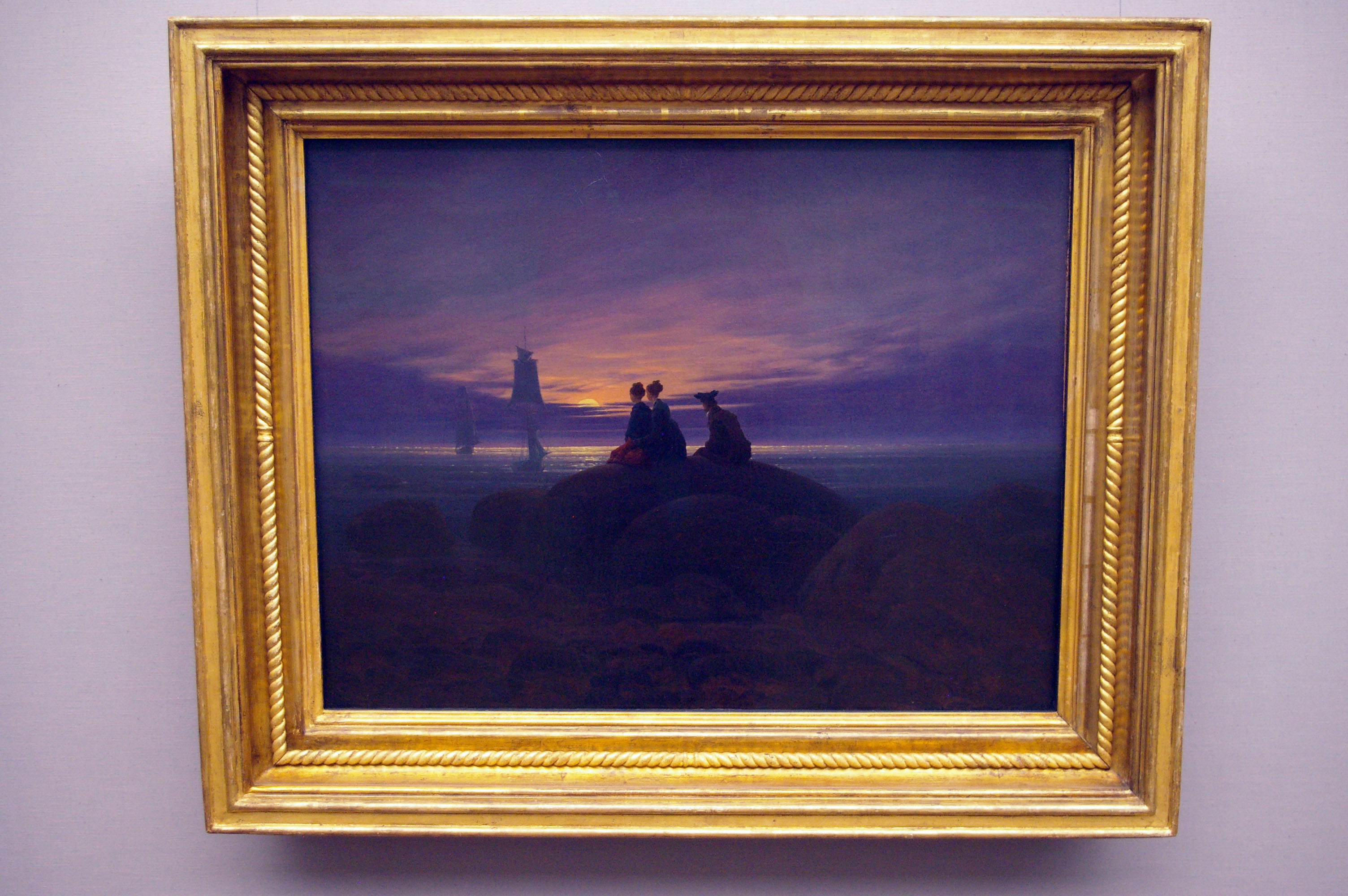 Mondaufgang am Meer (Öl auf Leinwand)